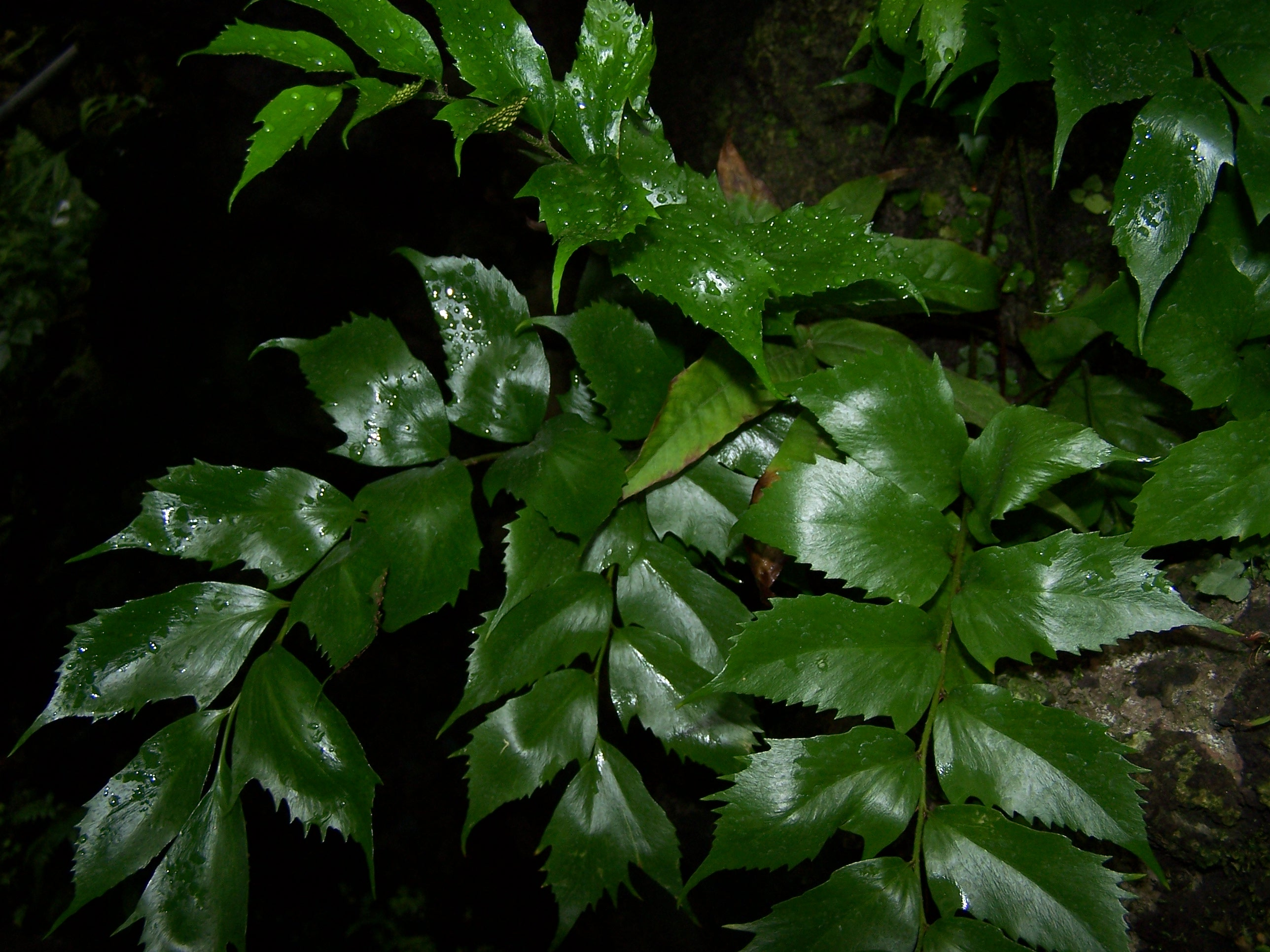 Asplenium nidus 17 juin 2006 Vieux jardin botanique de Göttingen